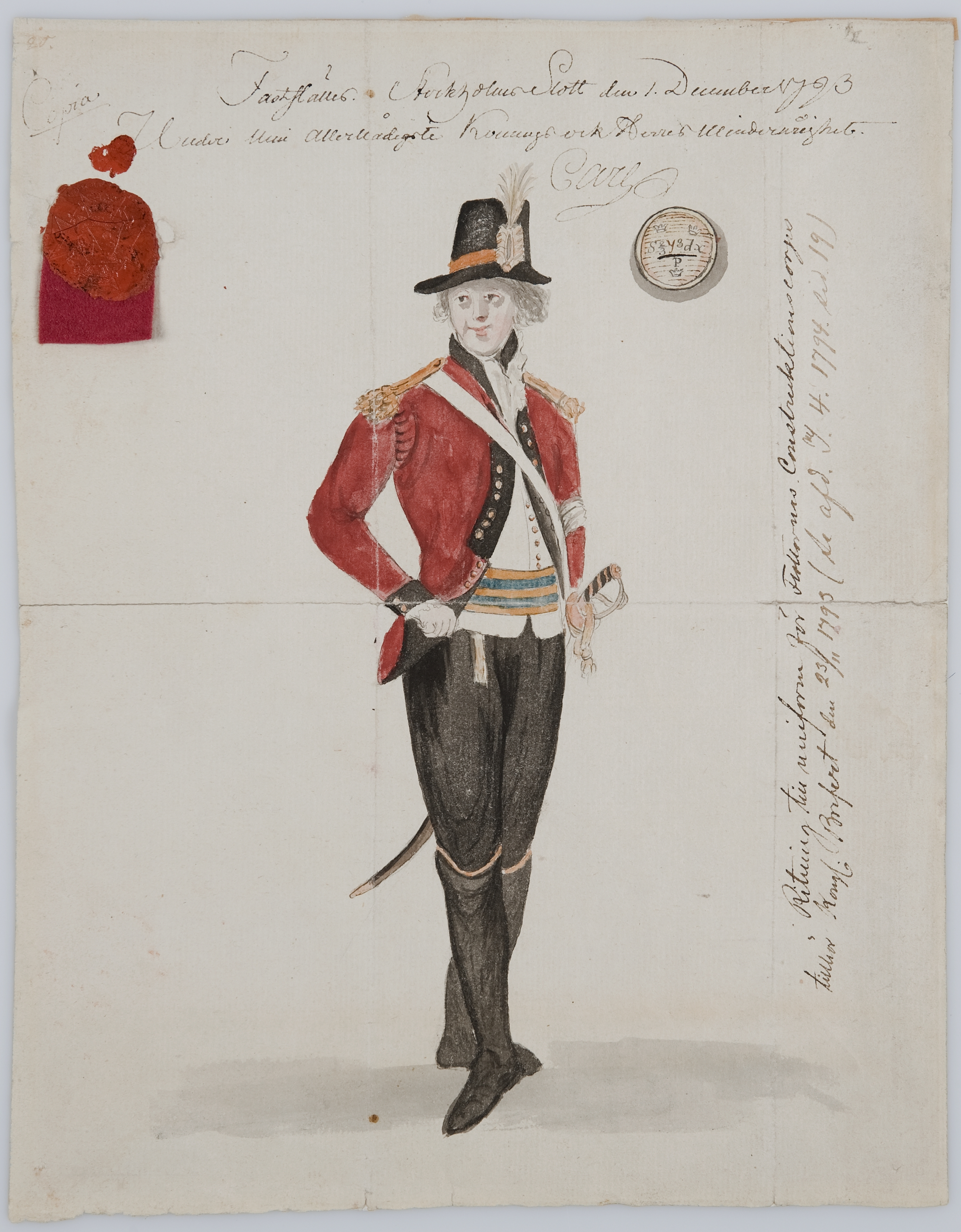 Uniformsteckning för flottornas Construktions Corps, har tillhört Kongl. Brefvet den 23/11 1793. Uniformen är av modell 1792.